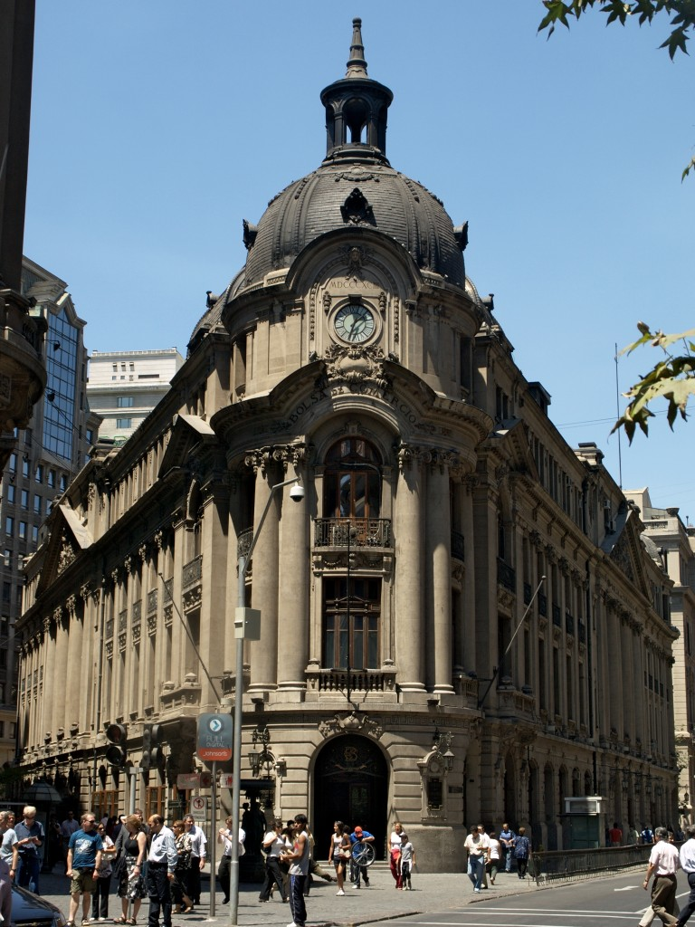 La Bourse du Commerce de Santiago du Chili